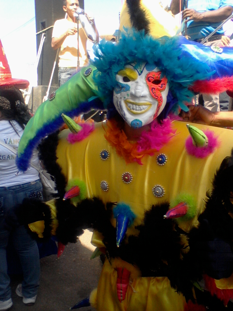 Tradicion cultural de La Vela, Estado Falcon